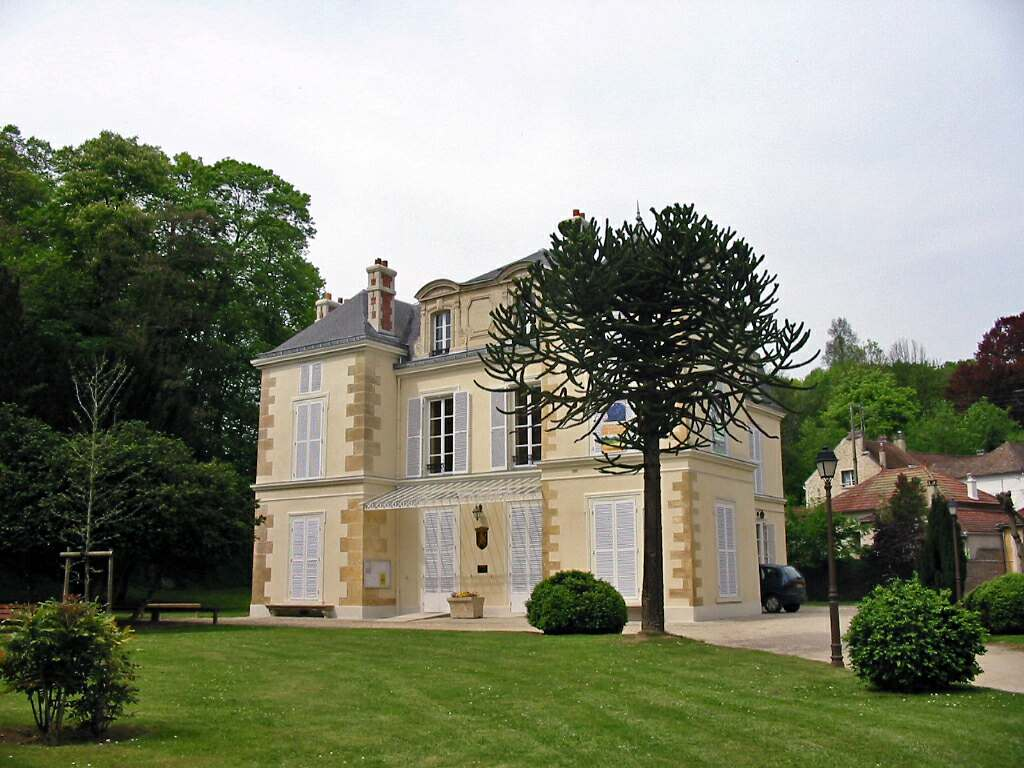 Mairie de Mézy-sur-Seine (Yvelines) Photo JH Mora, avril 2005 Catégorie:Image de Mézy-sur-Seine Mezy-sur-Seine